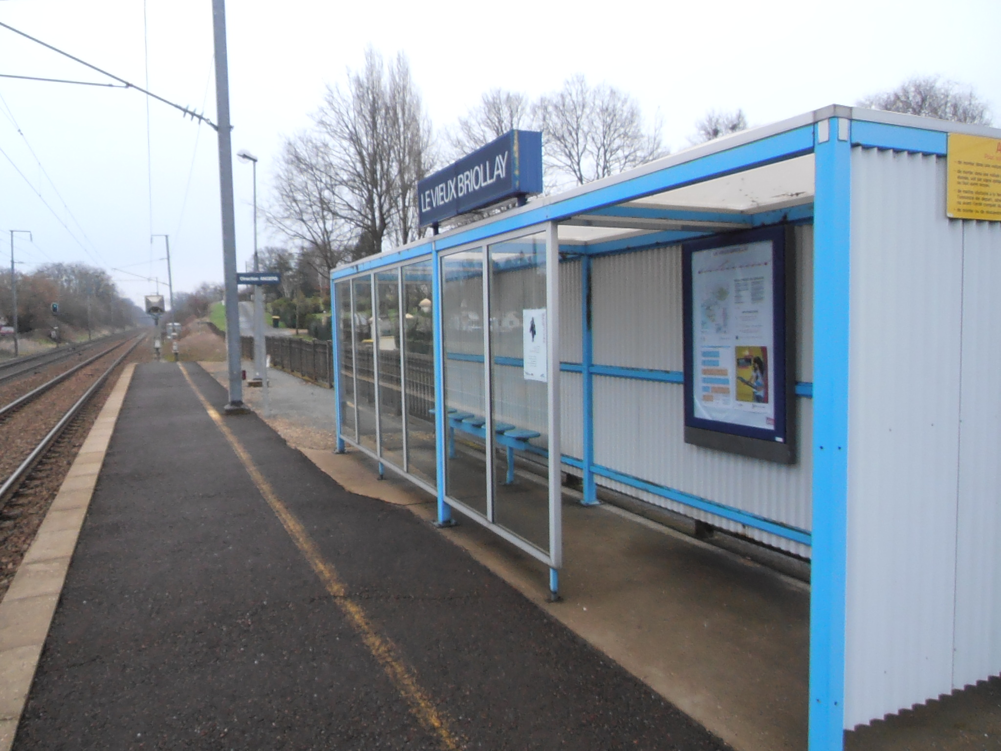 Une aubette de la halte ferroviaire de la gare du Vieux-Briollay, située sur la commune de Briollay (Maine-et-Loire, France).